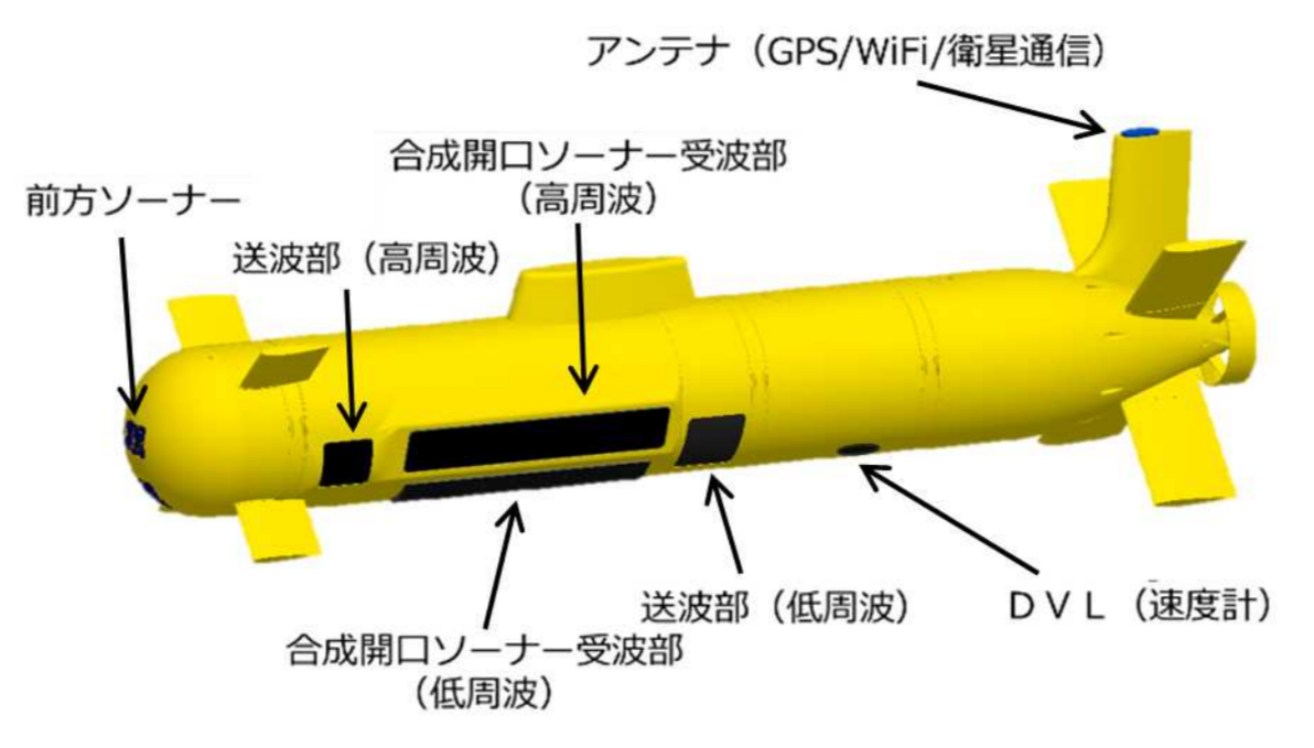 OZZ-5（自律型水中航走式機雷探知機）の航走体。三菱重工製造。